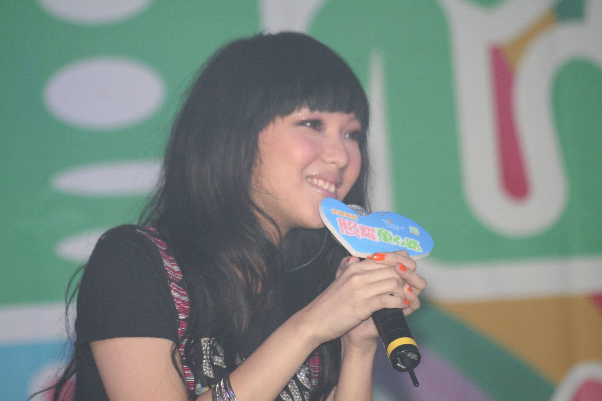 Jill Vidal